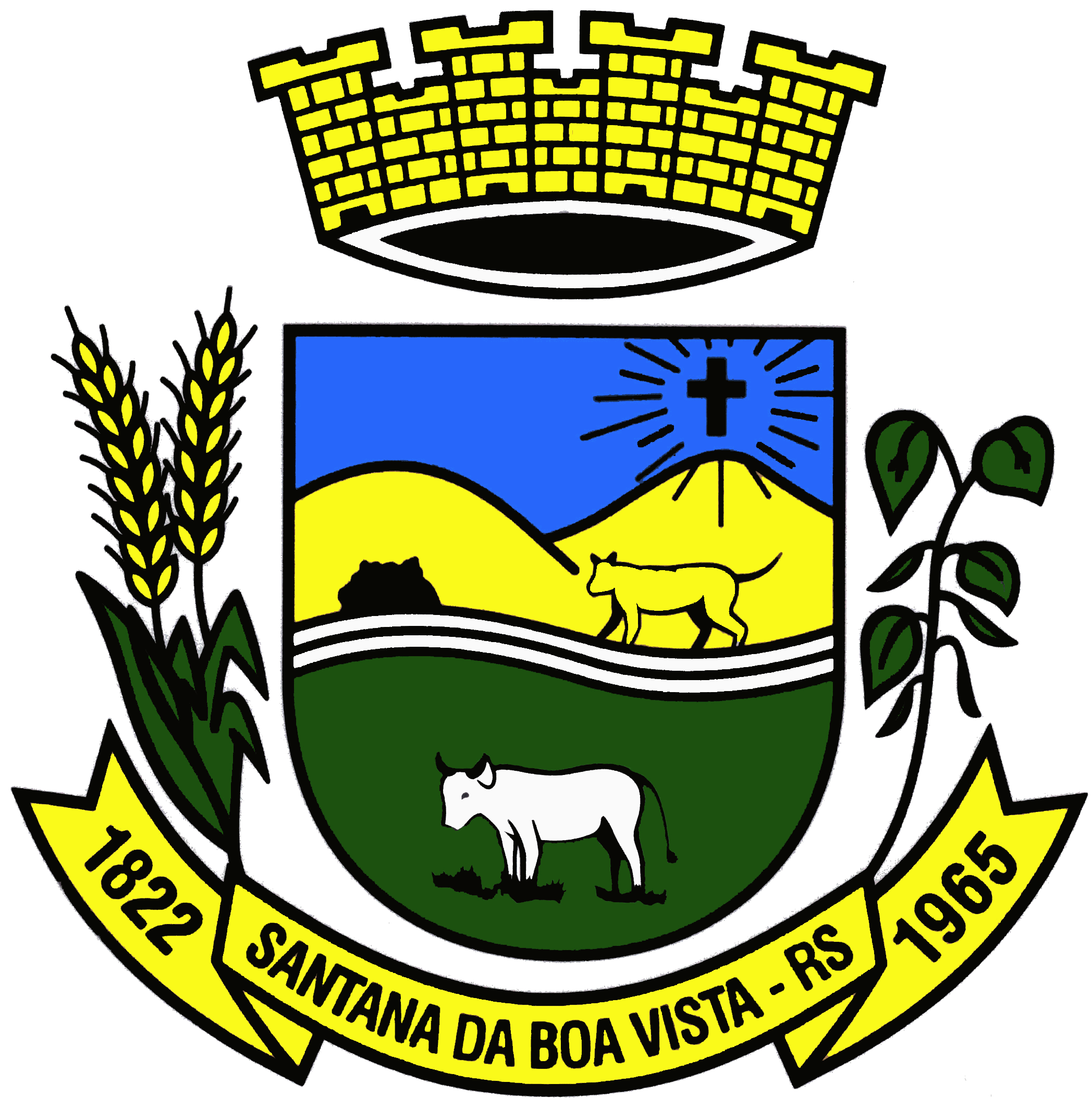 Brasão oficial do município de Santana da Boa Vista, no estado do Rio Grande do Sul, no Brasil